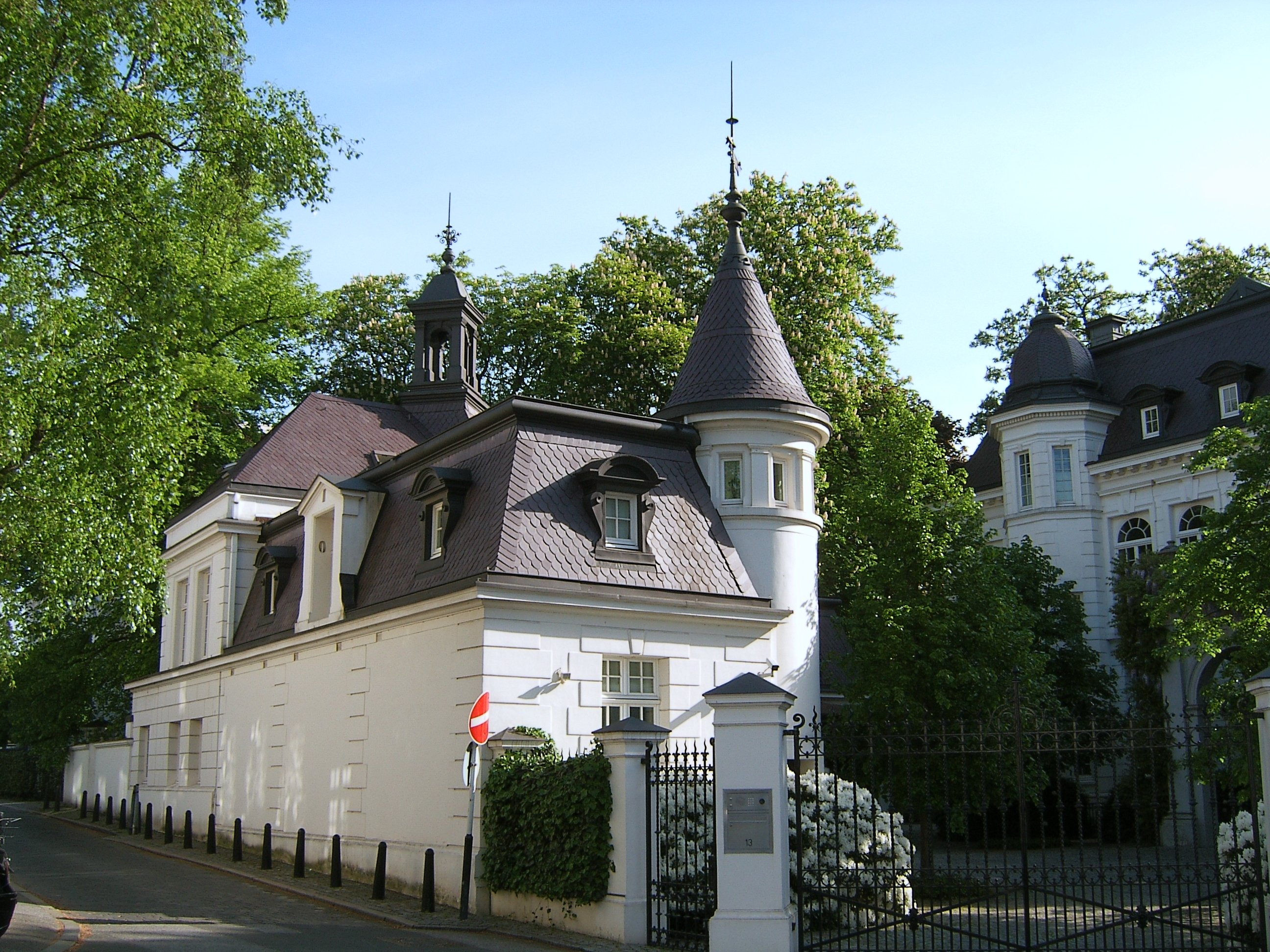 Hamburg, Pöseldorf, Milchstraße